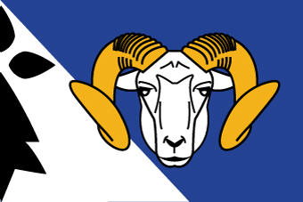 Drapeau du Pays Glazik